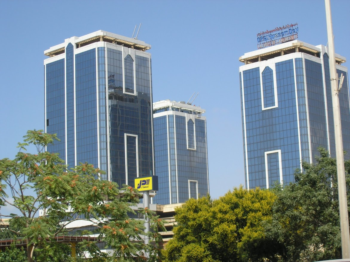 Tour husein dey OPGI